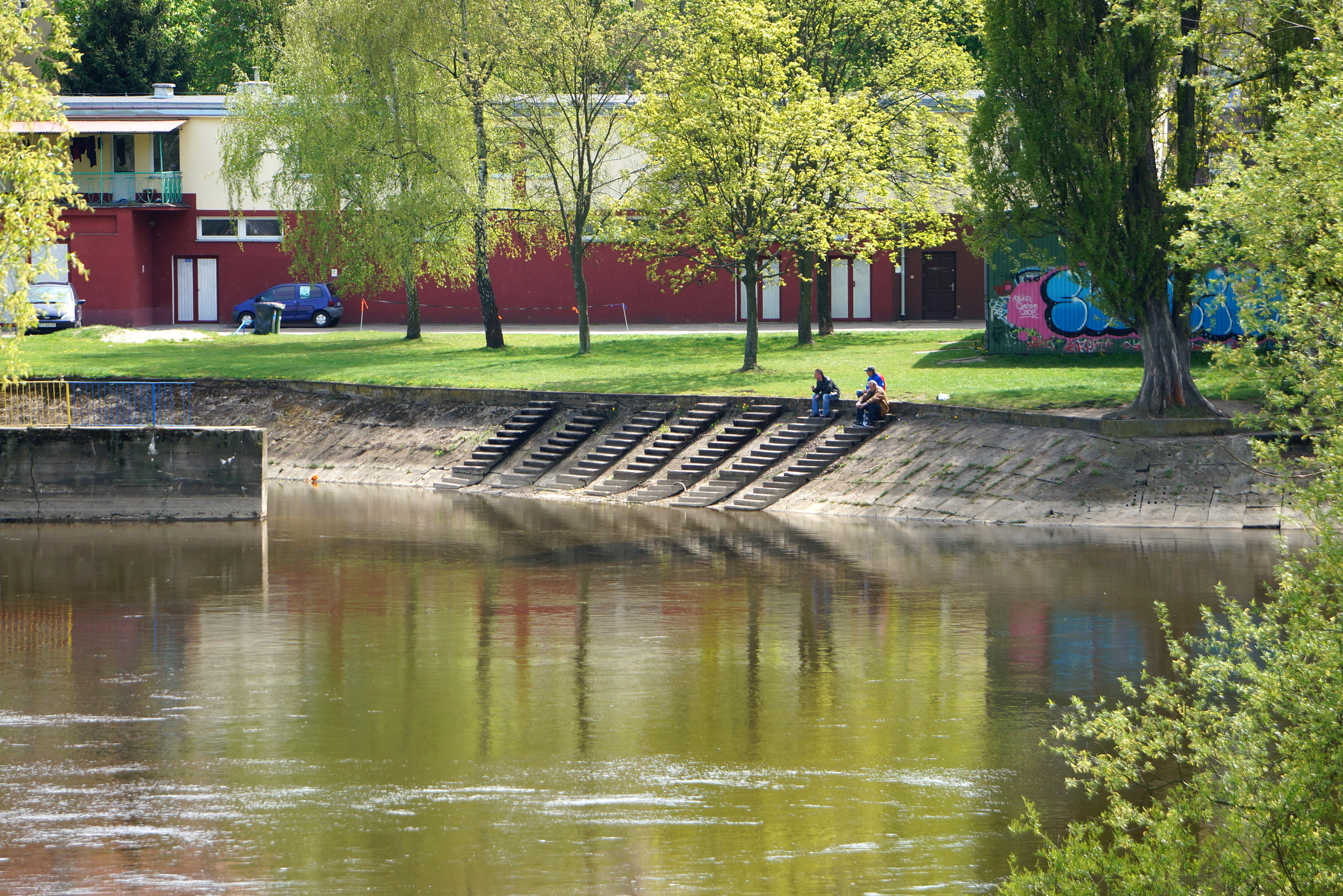 Gorzów Wlkp., ul. Fabryczna. Przystań klubu kajakowego na Warcie.